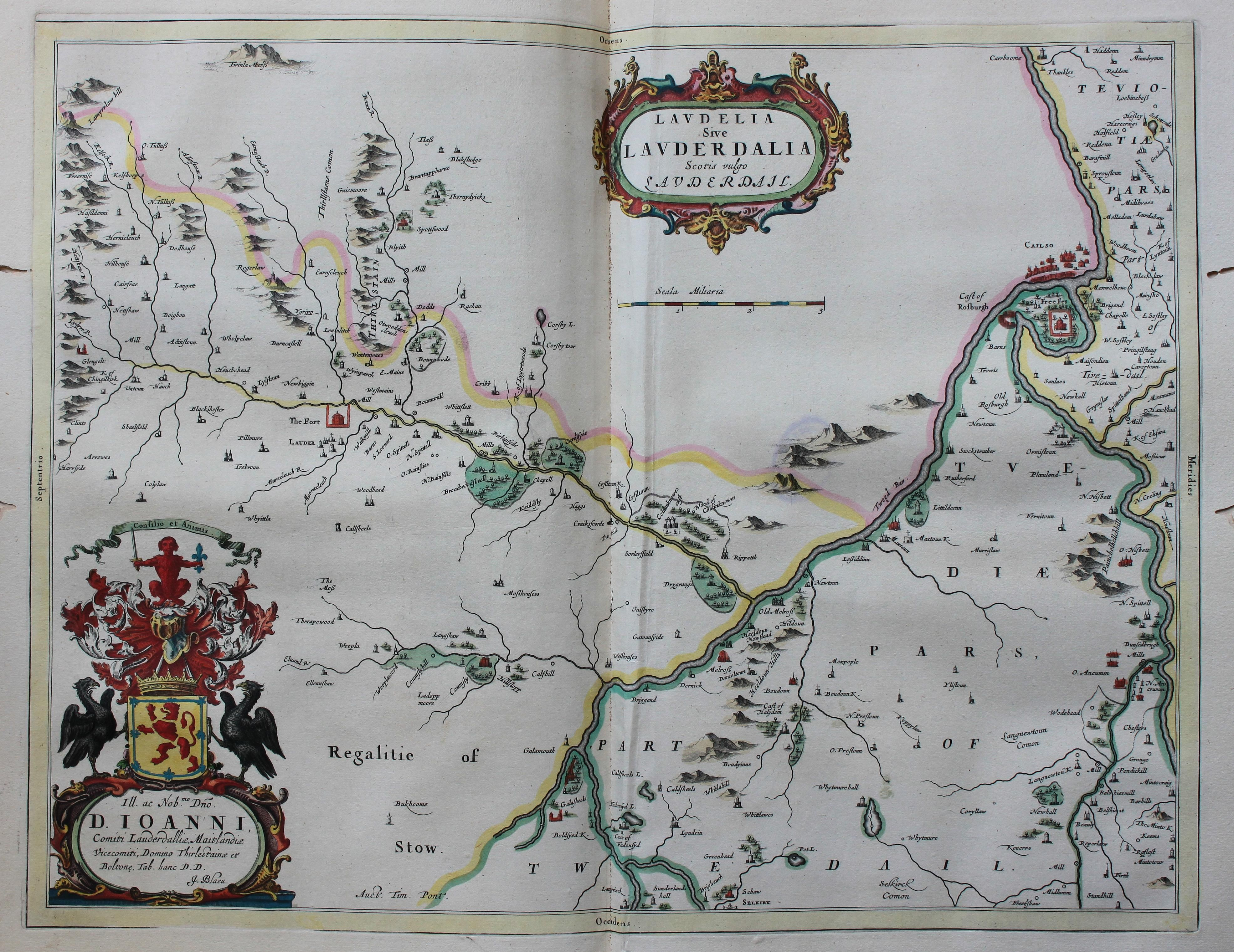 Descripción bibliográfica: Geographia Blaviana. - [Amsterdam : Juan Blaeu, 1659] . - [32], VI, 96 p., 34 f., h. 35a, 35b, 35c, 35d, 36-44 f., 34, [2], 36-40, [2], 43-70 [i. e. 75], [1] f., [20] p. de map., [9] f. de map., [4] f. pleg. de map., [2] f. de plan., [2] f. ge grab. : |bil. ; |cFol. marca major (57 cm.) . - En la dedicatoria a Felipe IV: "Presenta ... El Atlas Universal y Cosmographico de los orbes y terrestre ... Juan Blaeu" . - Título tomado del frontispicio. -- Privilegio fechado en 1659. -Errores de pag. - Sign.: 1, *2, **3, ***-****2, a-e2, A-I2, K1, L-Z2, Aa-Dd2, 4 2, Ee-Ff2, A-I2, K1, L2, M1, N-Y2, Z5, Aa-Dd2, Ee1, A-D2, E-F1, G-I2, K-L1, M-O2, P1, Q-Z2, Aa-Bb2, Cc1, Dd3, Ff-Zz2, Aaa-Bbb2, . - Frontispicio grab. col. -- Incluye un total de 49 il. entre map., plan. i grab. Materia: Atlas - Obras anteriores a 1800 Impresor: Blaeu, Joan, 1596-1673, imp. Lugar de impresión: Holanda. Amsterdam Localización: Vea la ilustración en su contexto Visite también la exposición "Cartografía histórica en la Biblioteca de la Universidad de Sevilla"